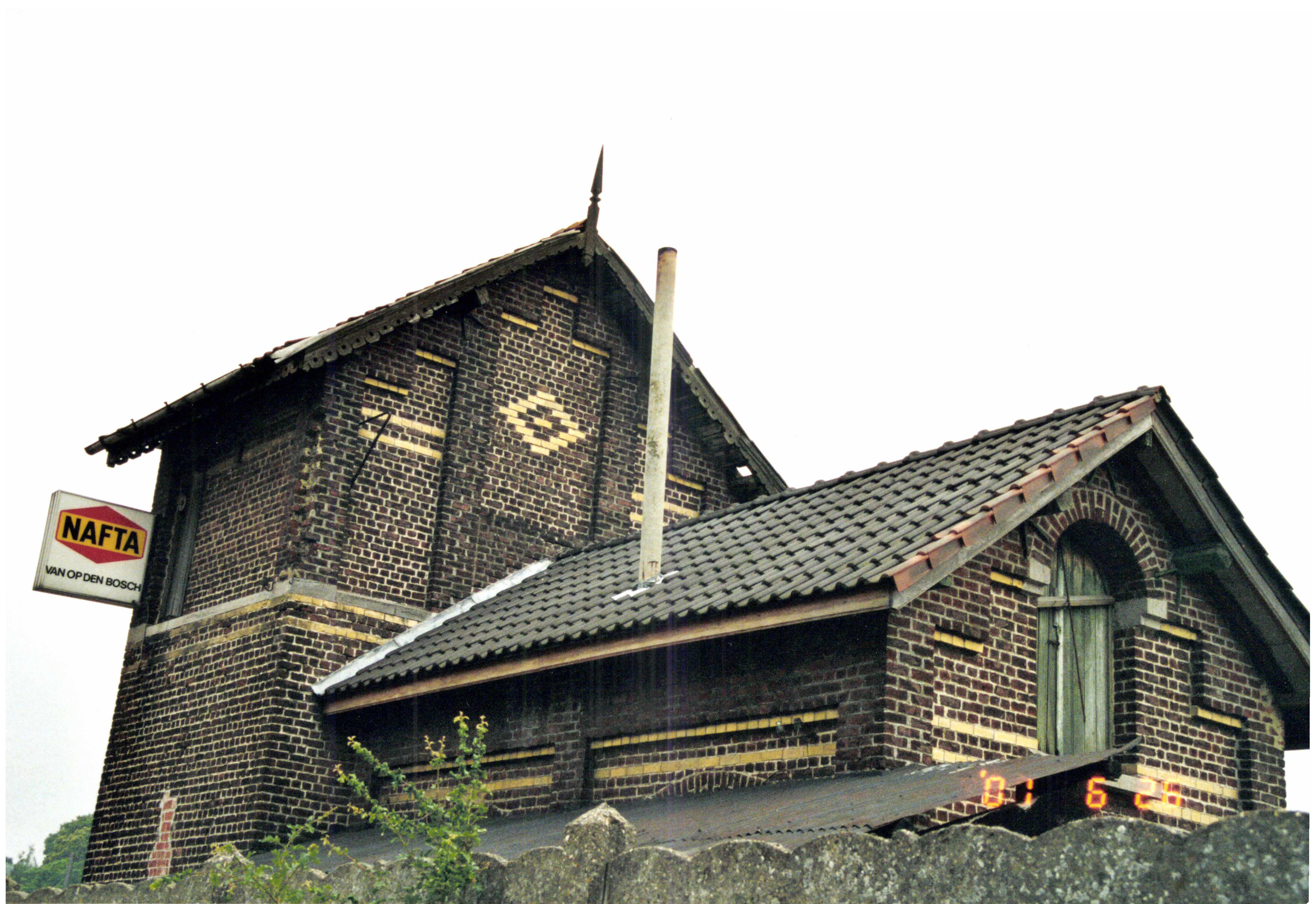 NMVB-tramstation met dienstgebouwen